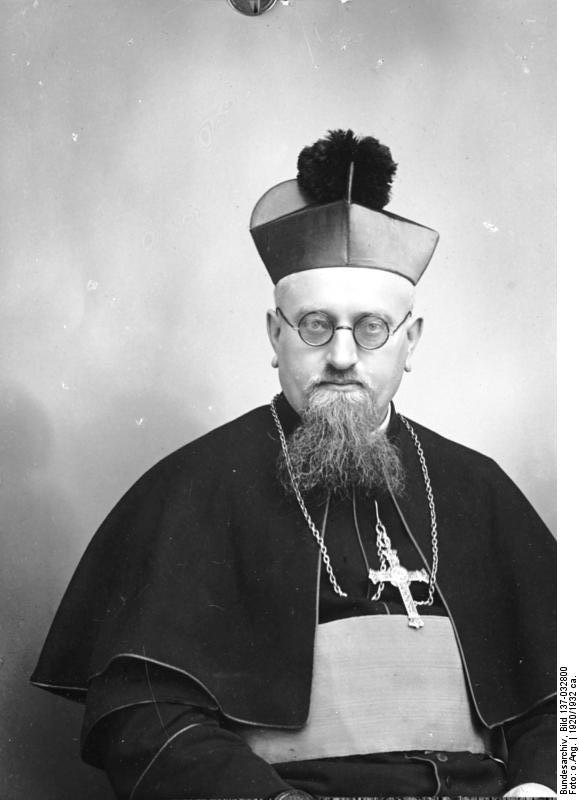 Bischof Georg Weiz China, Tsingtau Bischof Georg Weiz, Apostolischer Vikar von Tsingtau.